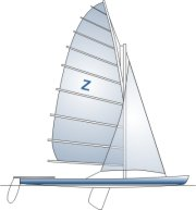 20 m² Rennjolle, Skizze von A.Ott nach Quellenangaben bei